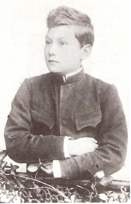 Theodor Däubler im Jahr 1888